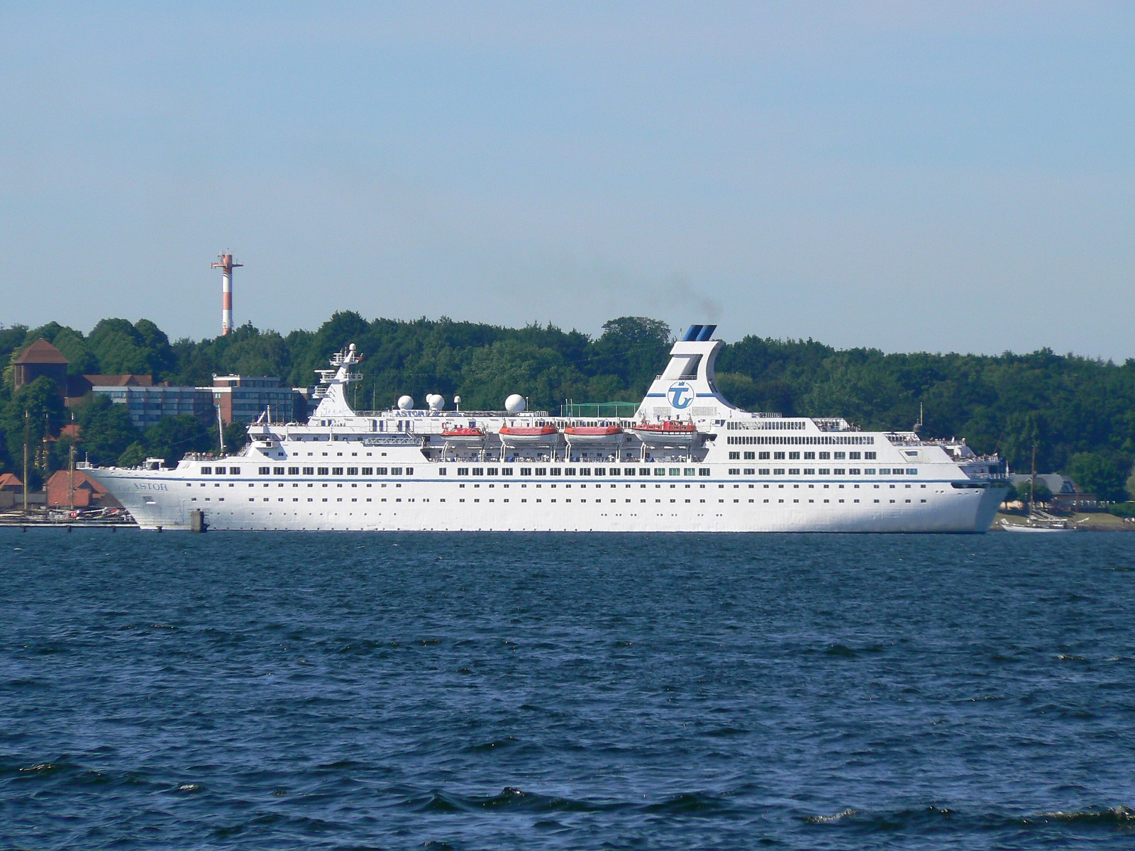 Kreuzfahrtschiff MS Astor auf der Kieler Förde bei der Einfahrt in den Nord-Ostsee-Kanal.